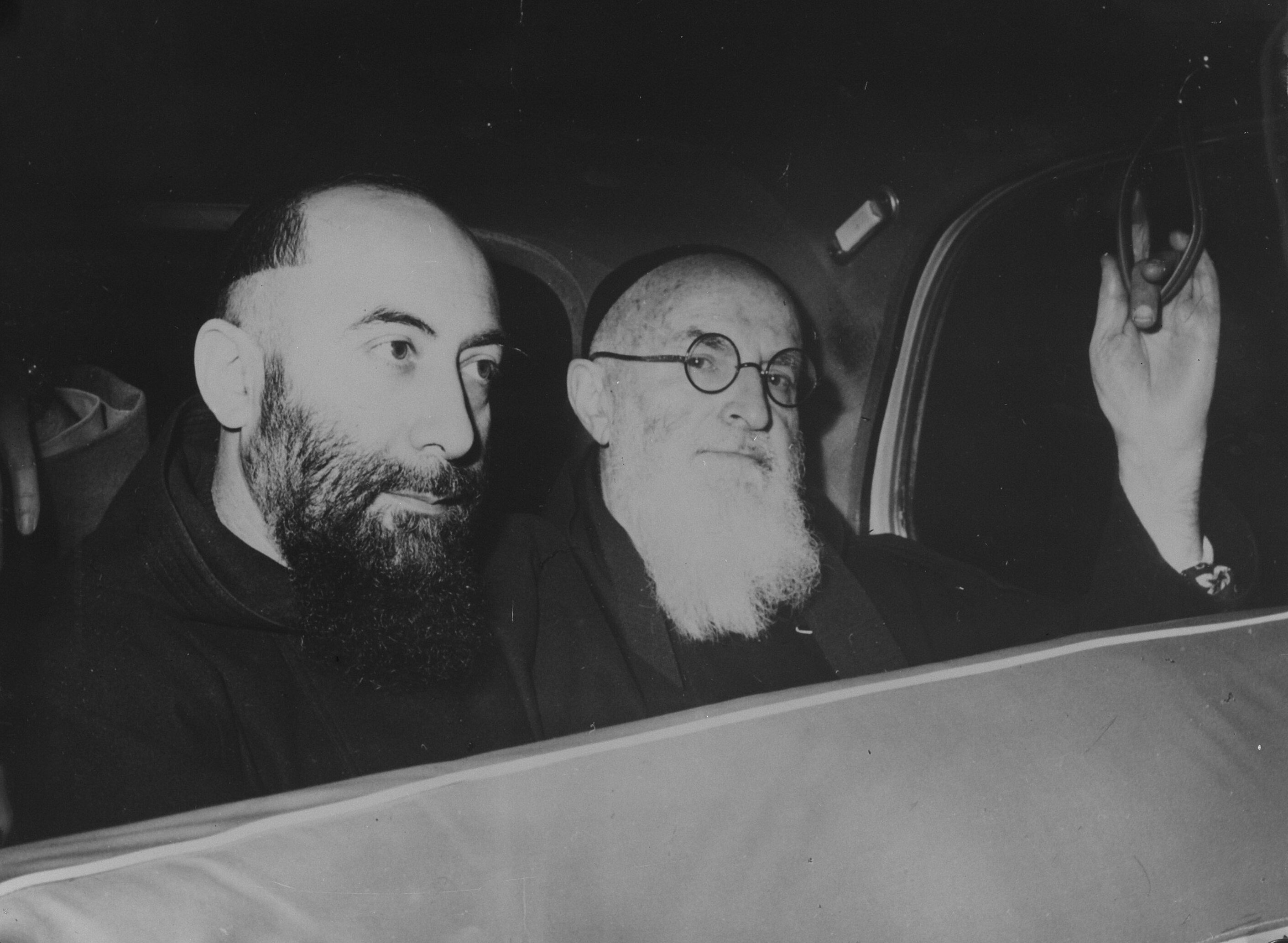 Collectie / Archief : Fotocollectie Anefo Reportage / Serie : [ onbekend ] Beschrijving : Monniken (Vittorio links en Carmelo rechts) van afpersing beschuldigd Datum : 13 maart 1962 Trefwoorden : MONNIKEN Fotograaf : Fotograaf Onbekend / Anefo Auteursrechthebbende : Nationaal Archief Materiaalsoort : Glasnegatief Nummer archiefinventaris : bekijk toegang 2.24.01.09 Bestanddeelnummer : 913-6346